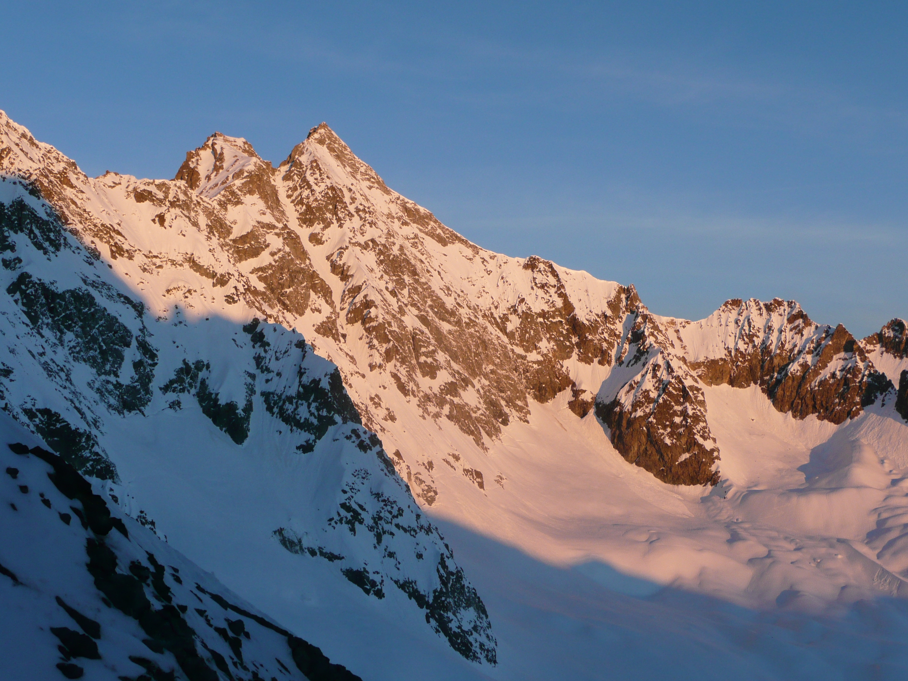 Face E du pic de Neige cordier depuis les Agneaux